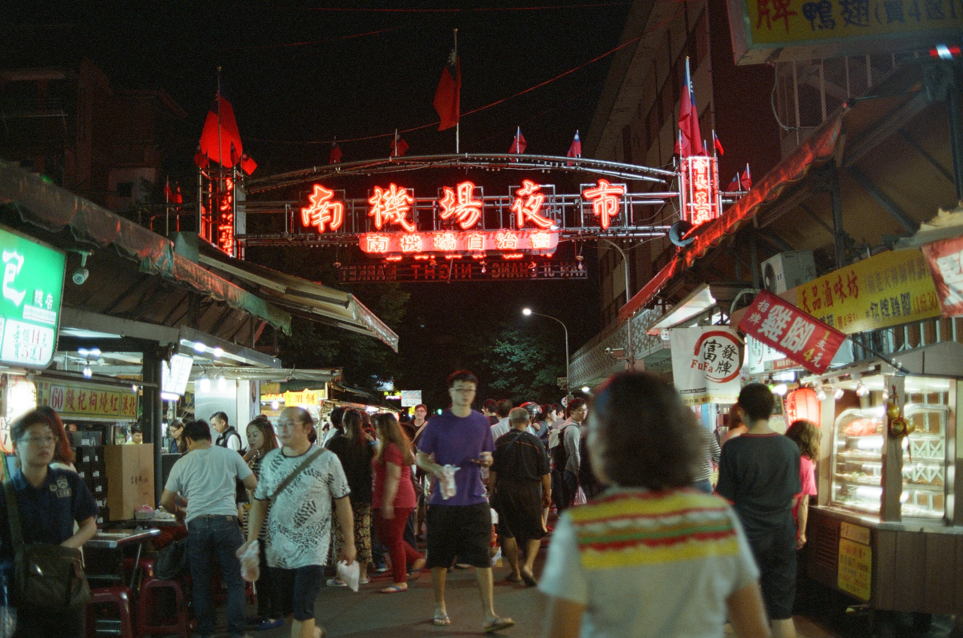 中文（台灣）: 插著中華民國國旗的南機場夜市霓虹燈標誌夜景。